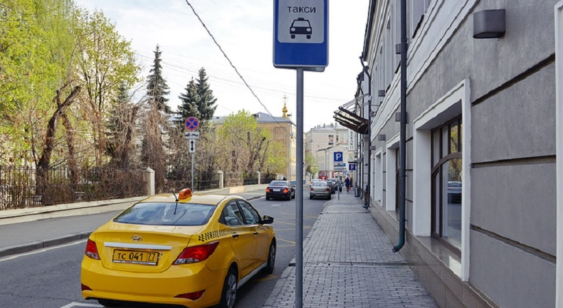 Место стоянки легкового такси (Москва)